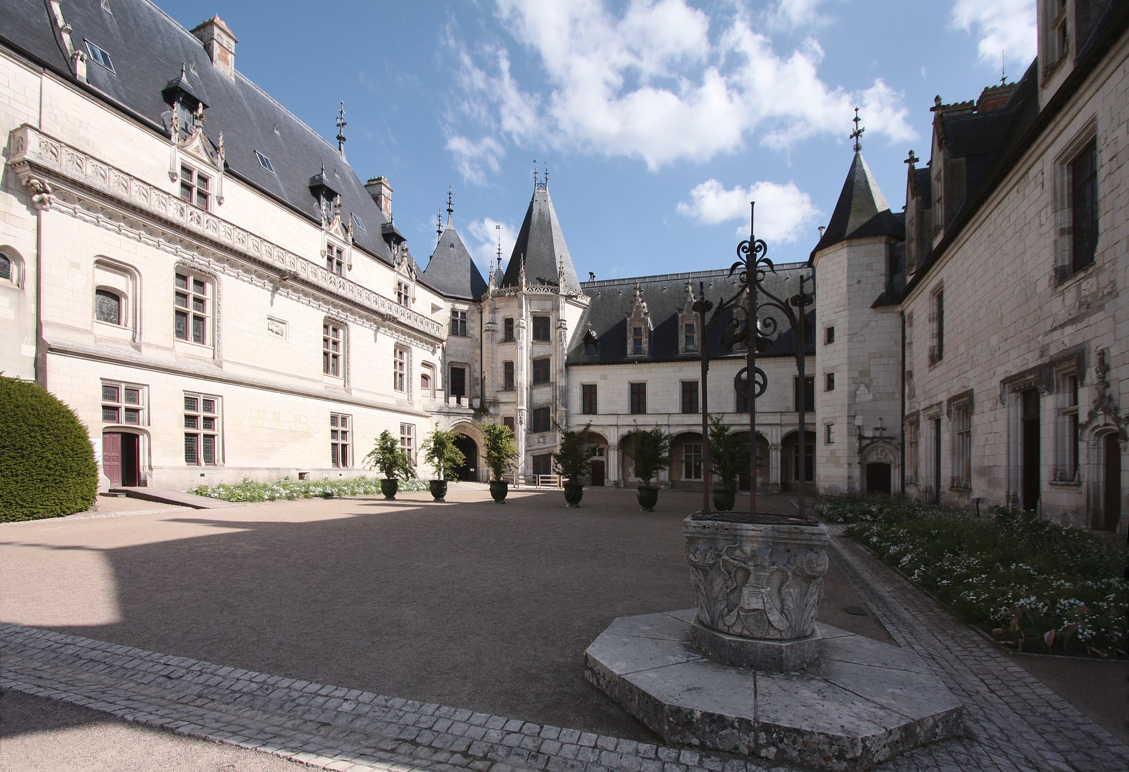 Château de Chaumont-sur-Loire, Departement Centre/Frankreich - Innenhof